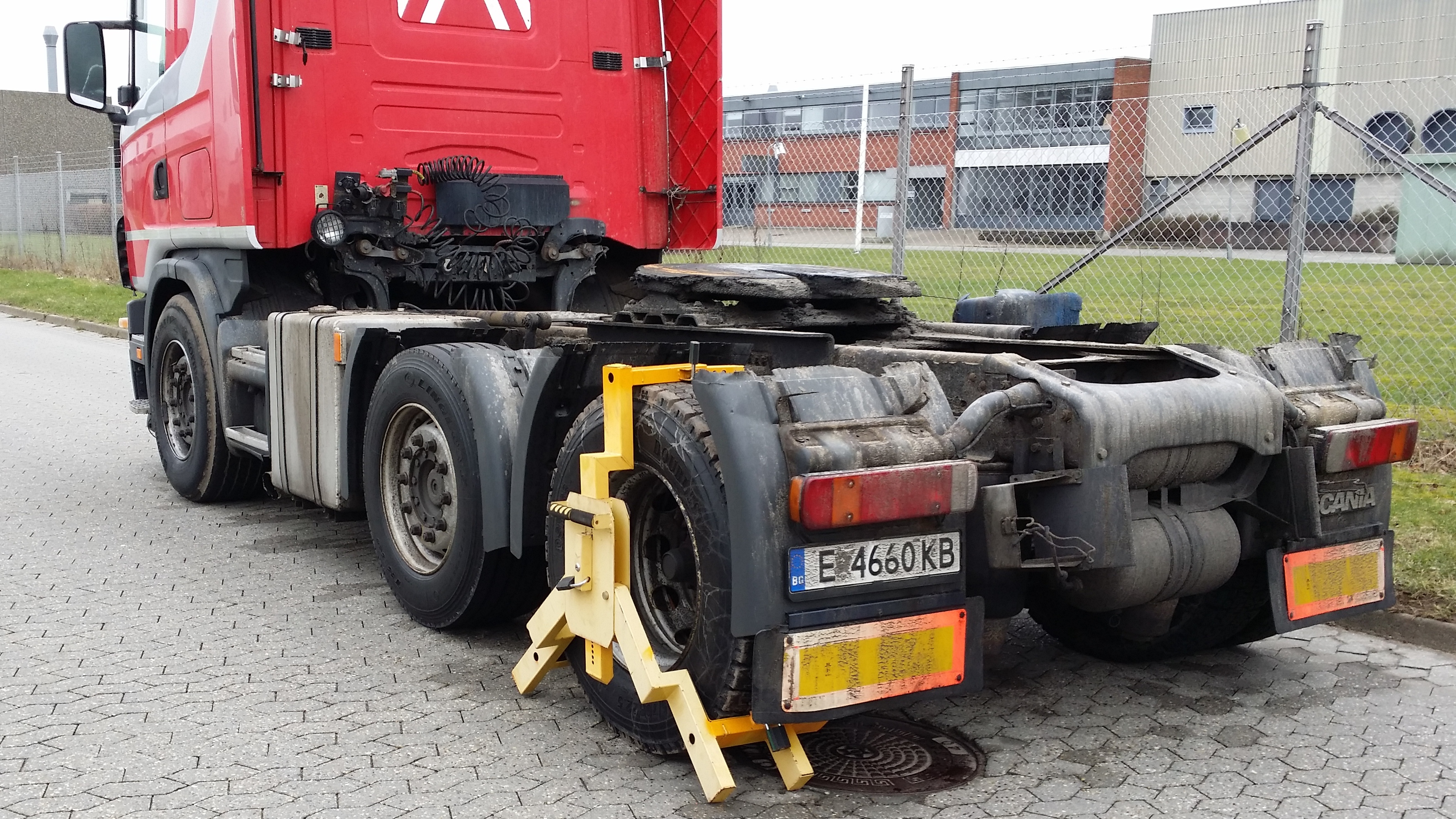 I tilfælde af at dansk politi ikke kan inddrive en given bøde for f.eks. Piratkørsel, er der hjemmel til at klampe motorkøretøjet til bøden er betalt, eller der er stillet garanti for bødens betaling.